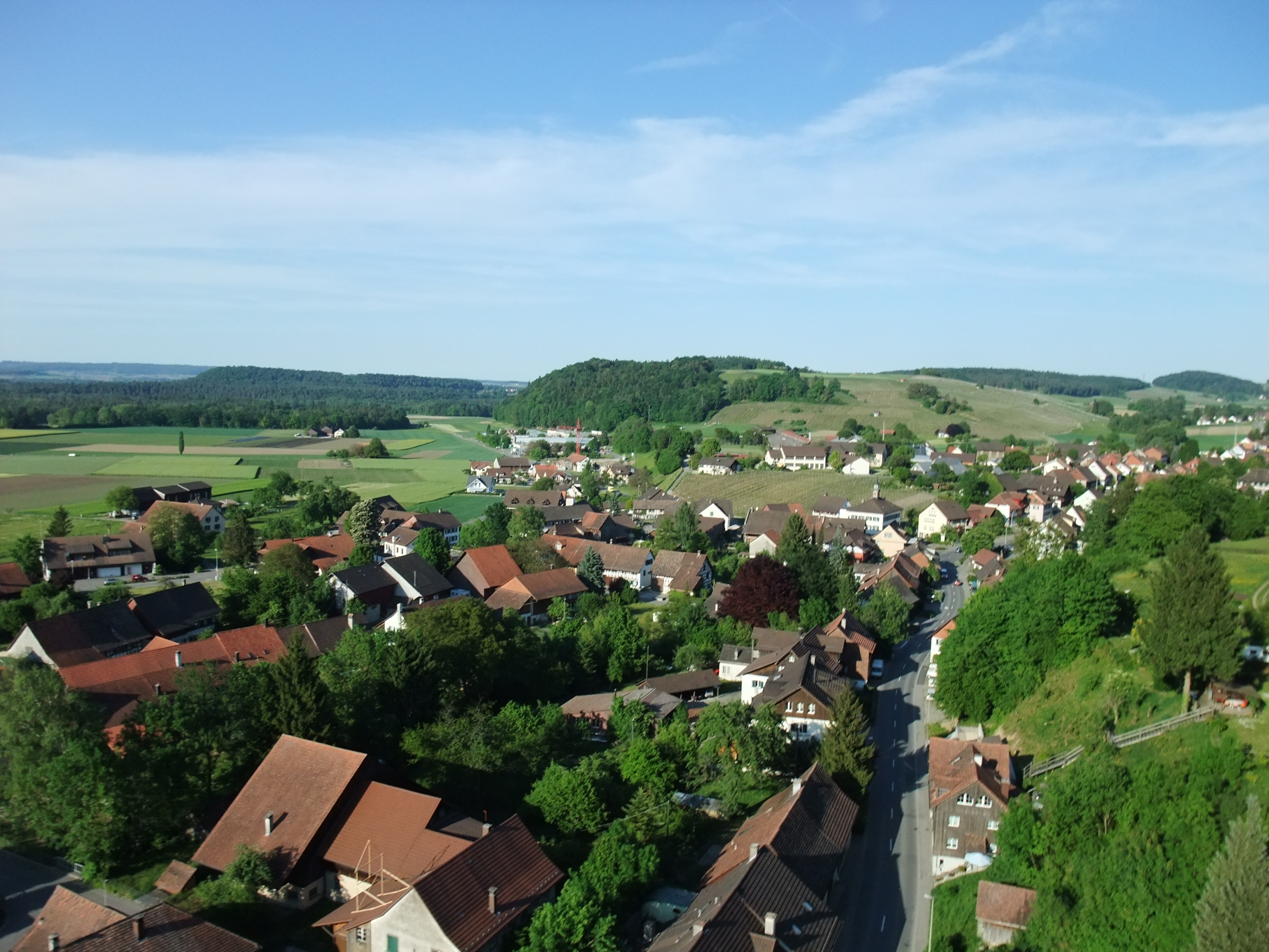 Blick über Flaach